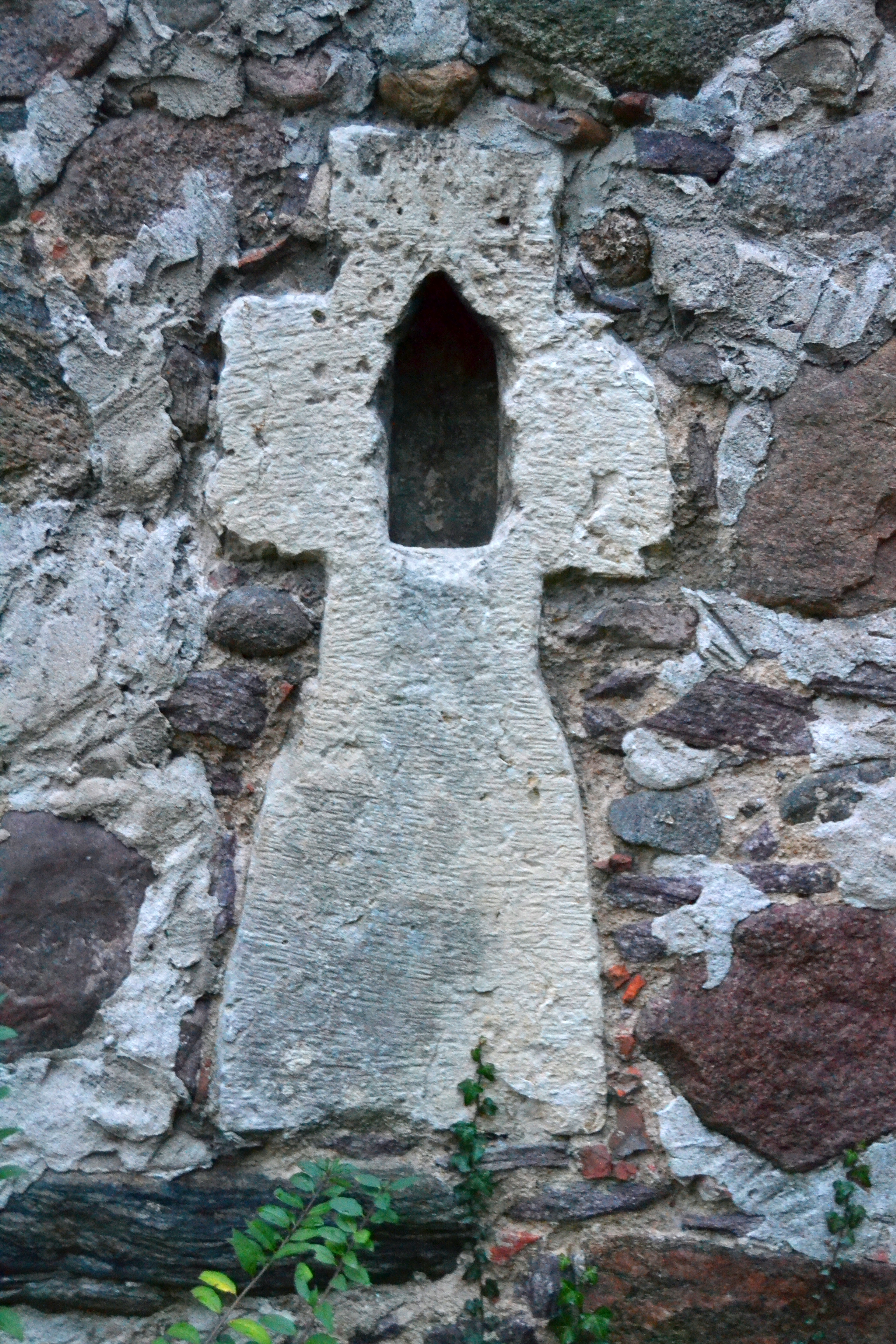 Dorfkirche und Kirchhof von Klein-Schönebeck (Schöneiche bei Berlin).